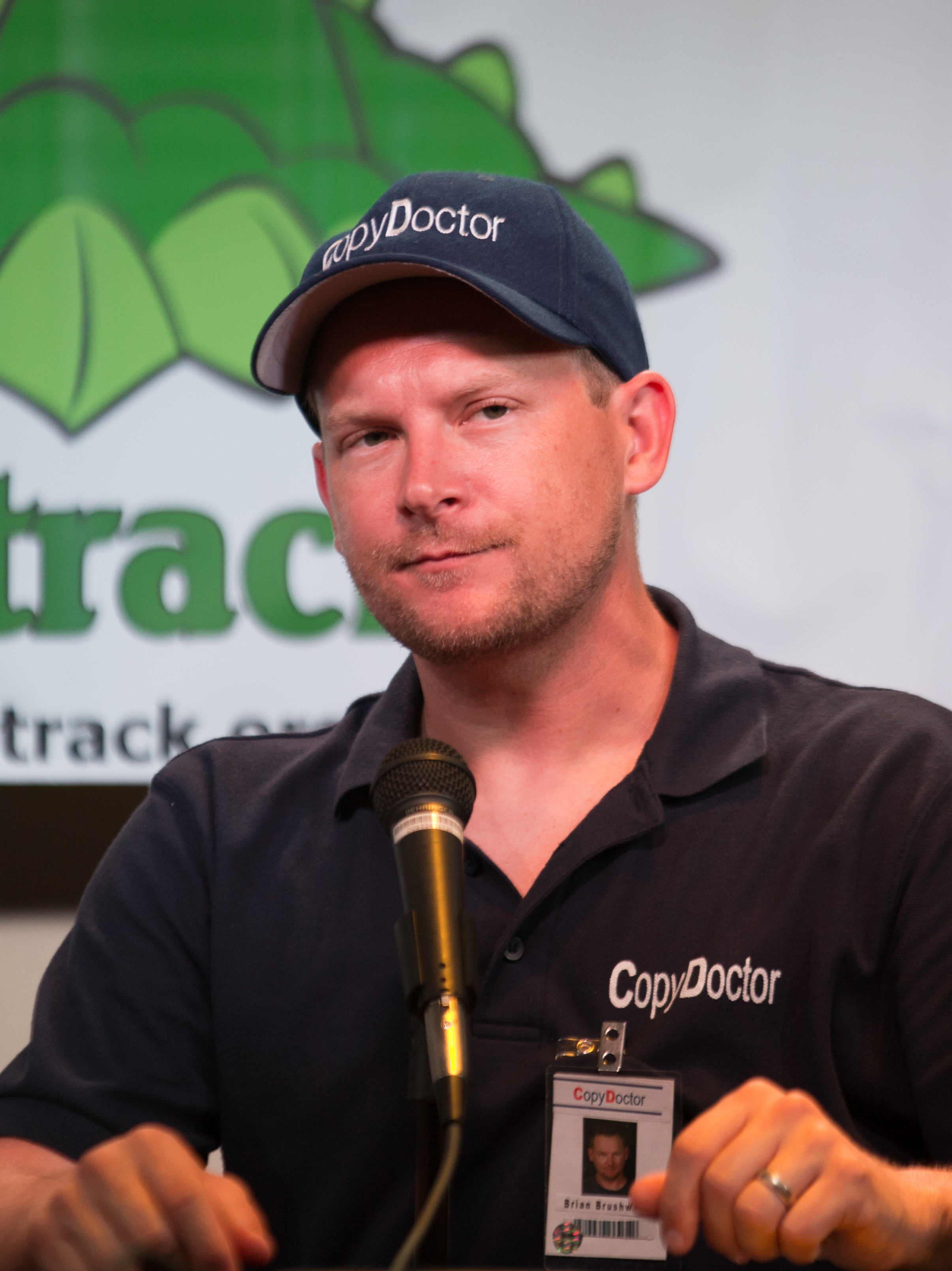 20140831-173242-Dragoncon-04777